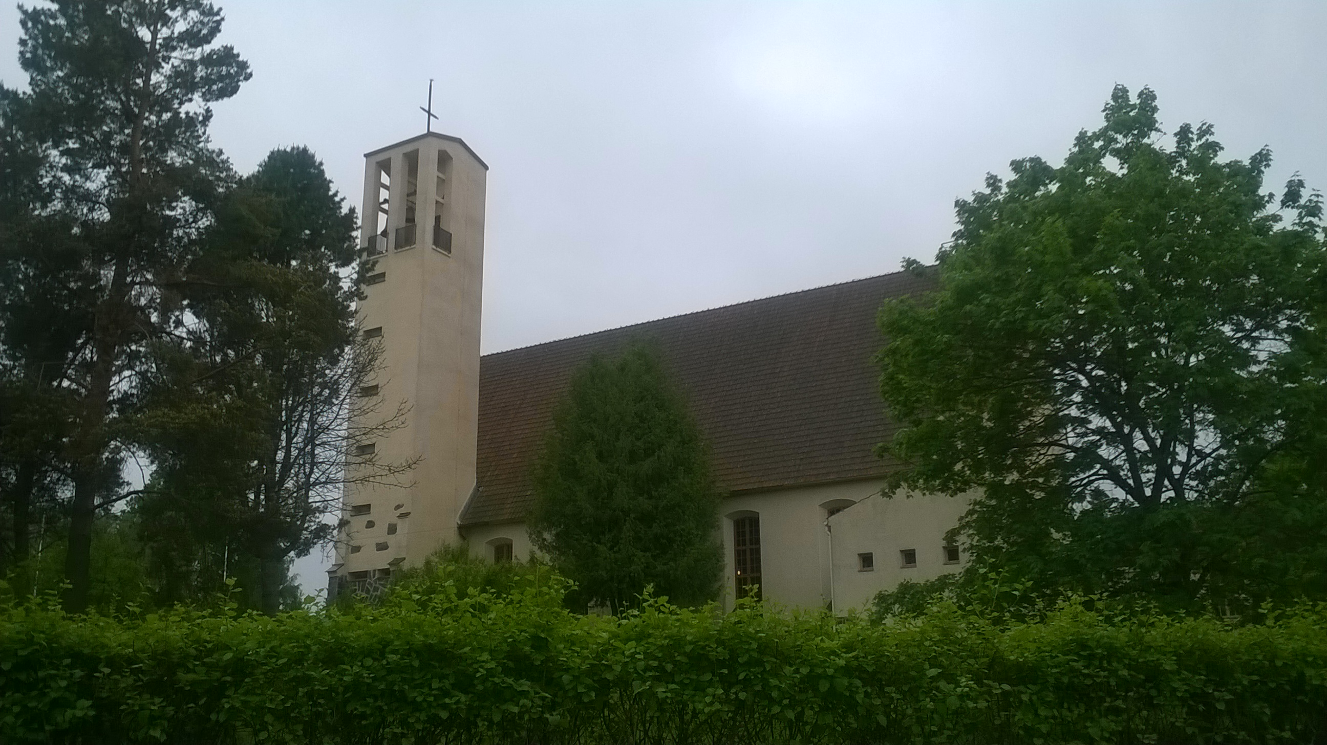 Viialan kirkko